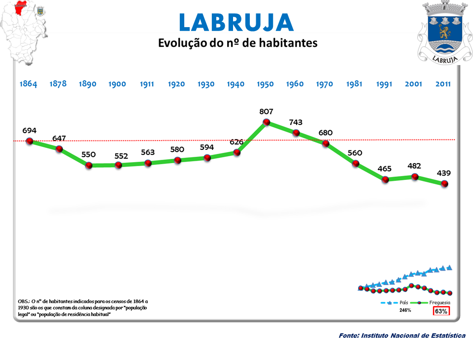 Cenos 1864/2011